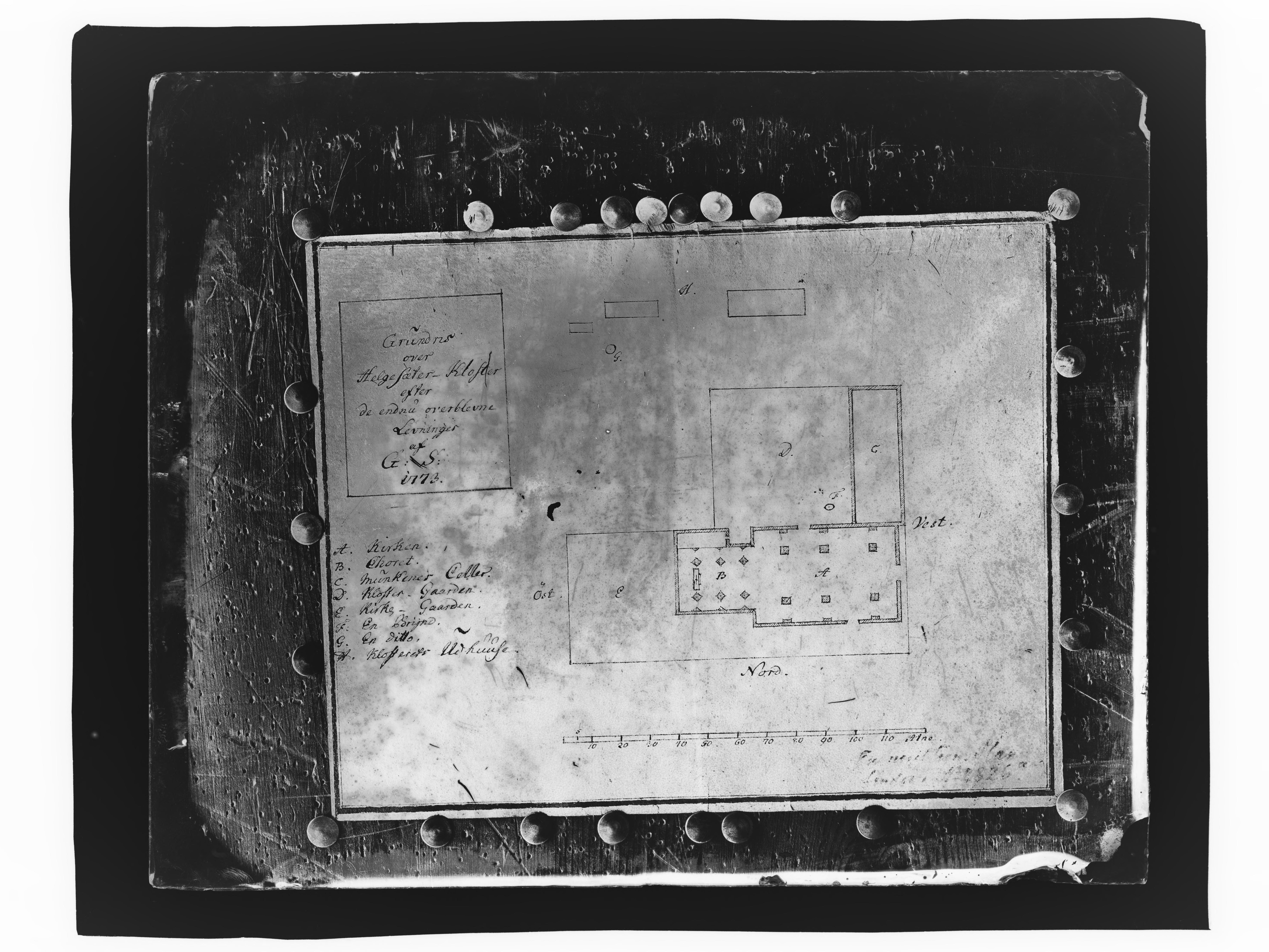 Påskrift konvolutt: A-324 Trondheim. Helgeseter kloster ruin. Grunnplan. [Riksantikvaren] Sted: Elgeseter Kommune: Trondheim Fylke: Sør Trøndelag Tagger: plantegning: grunnplan over Helgeseter kloster